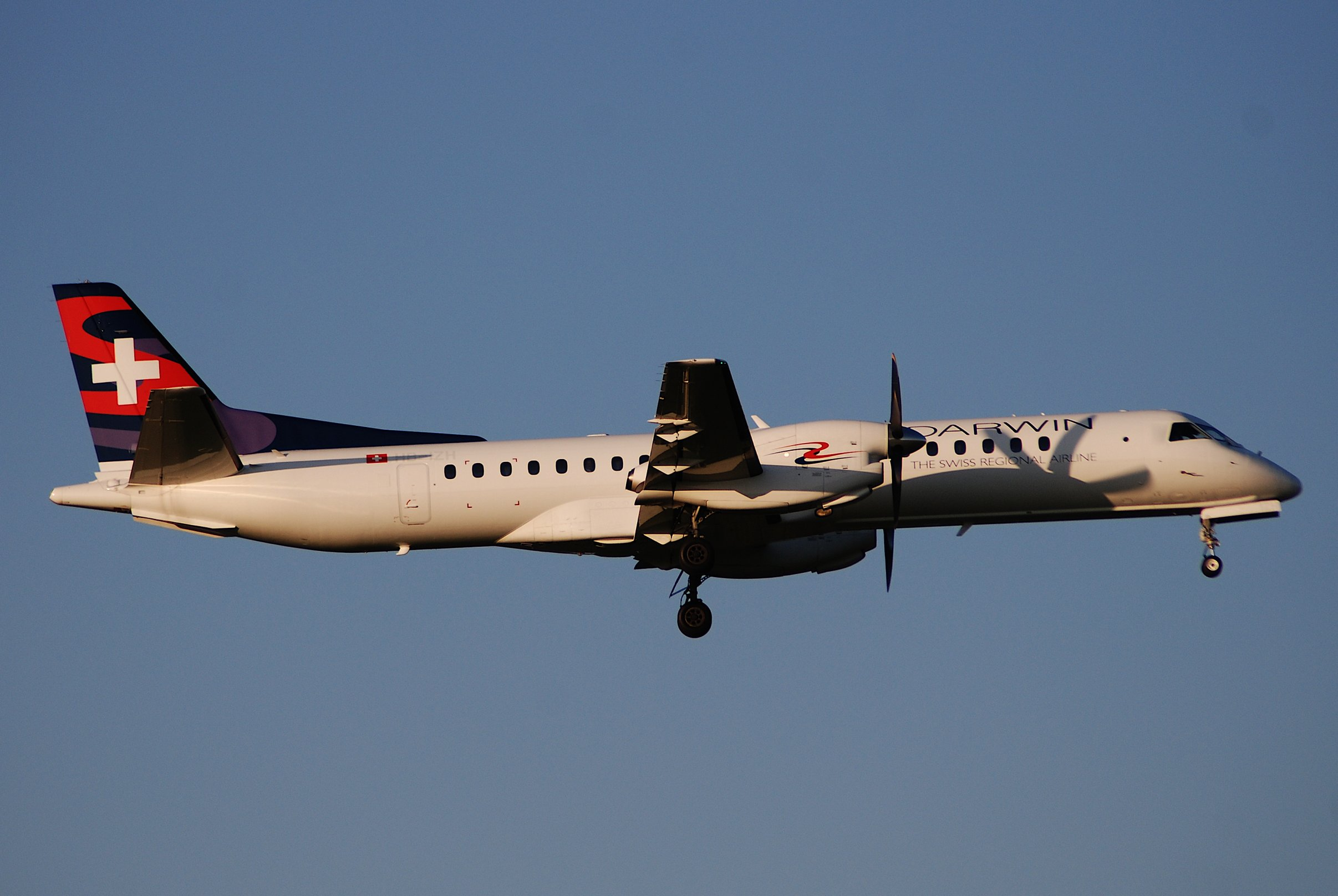 Darwin Airline Saab 2000; HB-IZH@ZRH;14.04.2007/459cu